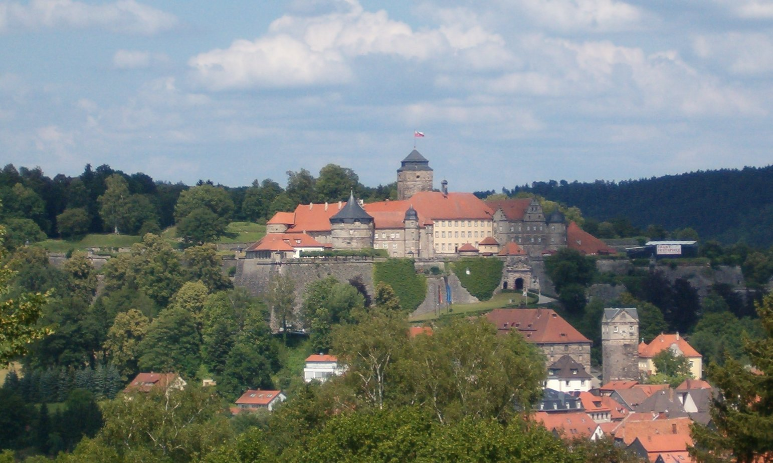 Festung Rosenberg in Kronach (Bayern), Heuni.